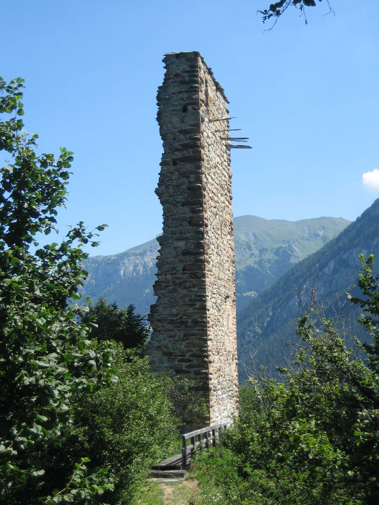 Fenster, Verputz mit Fugenstrich